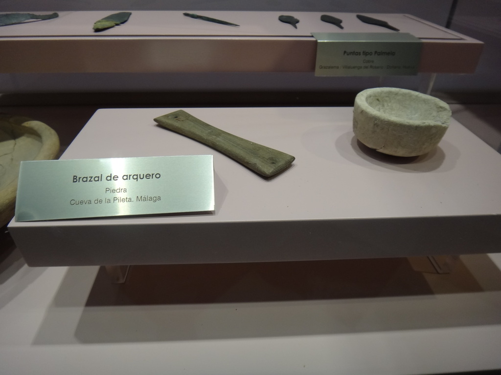 Museo Arqueológico de Jerez de la Frontera (Andalucía, España).